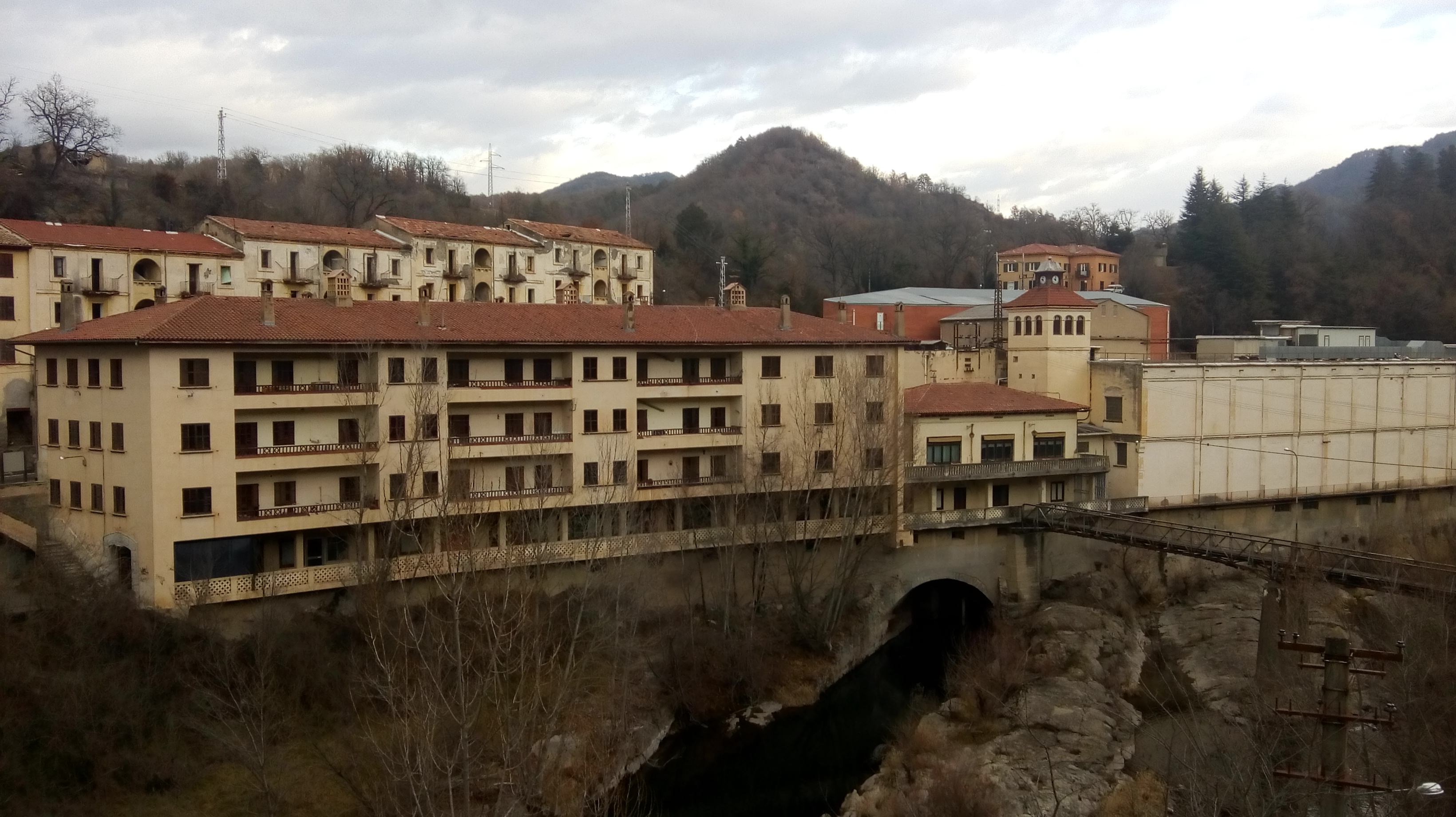 Vista general de La Farga de Bebié